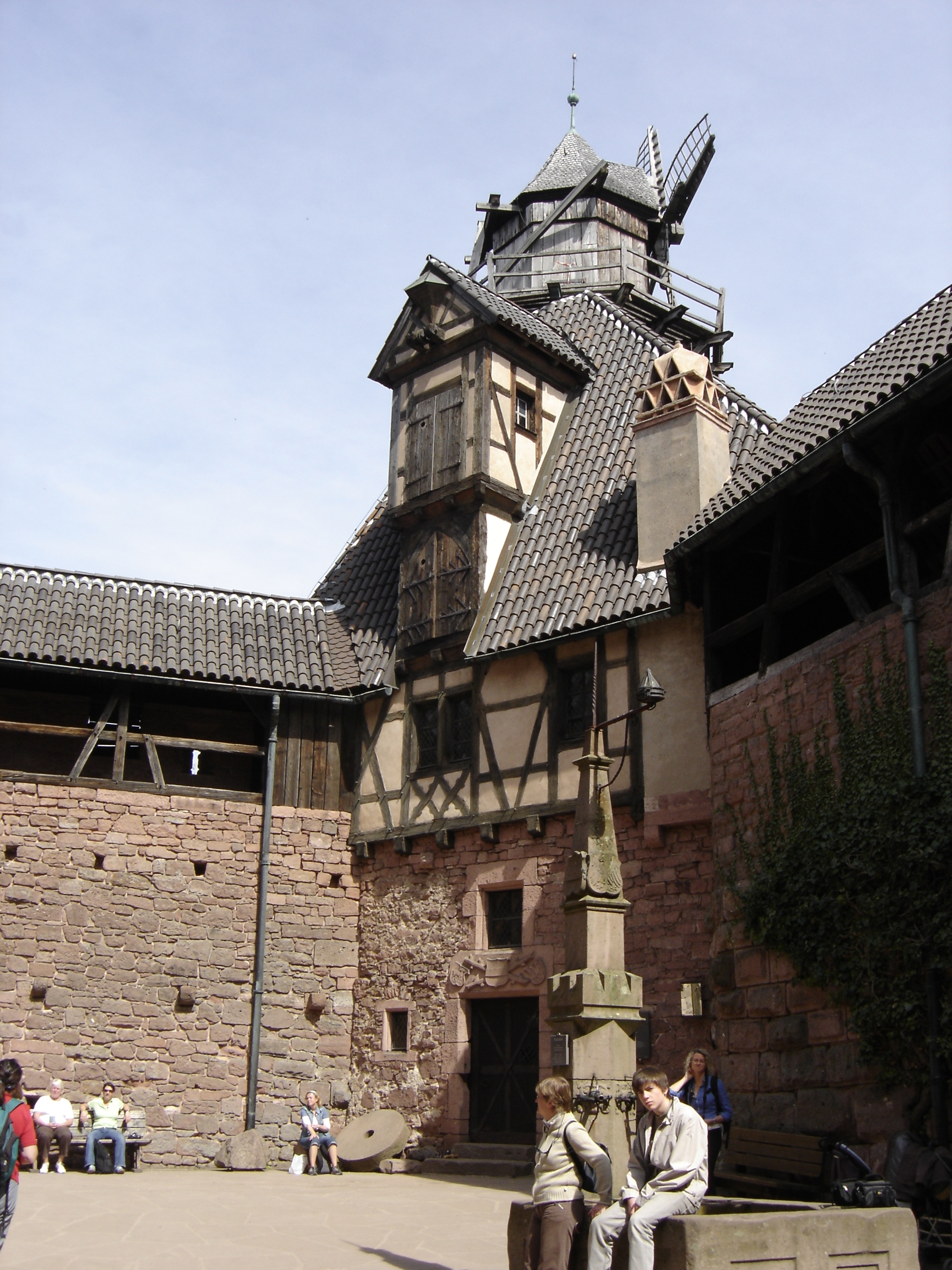 Haut-Koenigsbourg - Windmühle